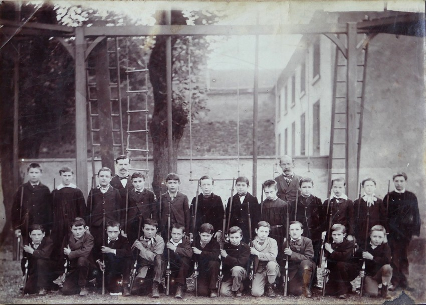 Un bataillon scolaire, photographié par Piquet et Dreux (rue Caplat, Paris XVIIIe arrond). Vers 1885. 22 x 15,5 cm, collection privée du déposant.